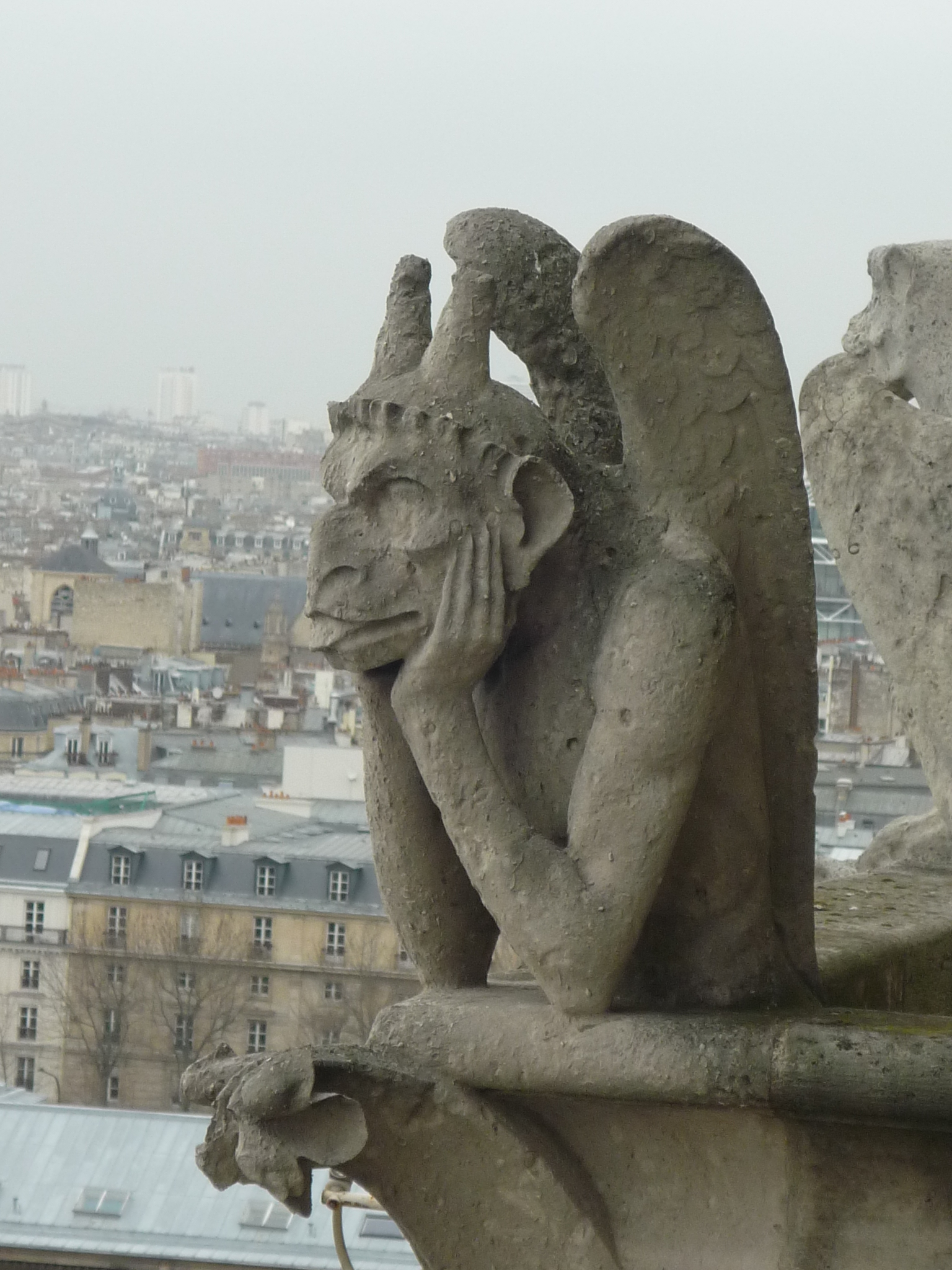 Eine Drolerie auf Notre Dame de Paris, Frankreich.